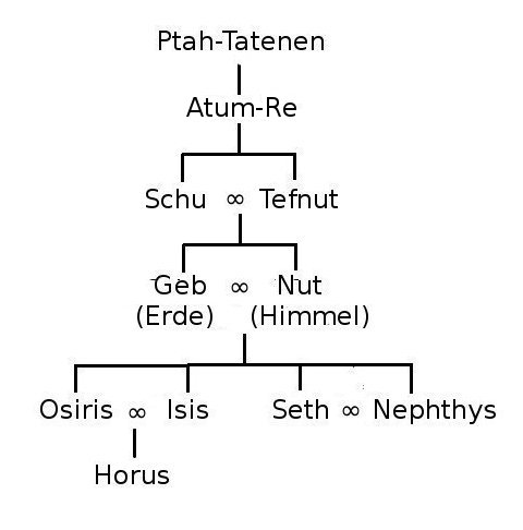 Die memphitische Theologie, die über den Schöpfer Atum-Re und über die Götterneunheit von Heliopolis noch den Gott Ptah-Tatenen stellt.